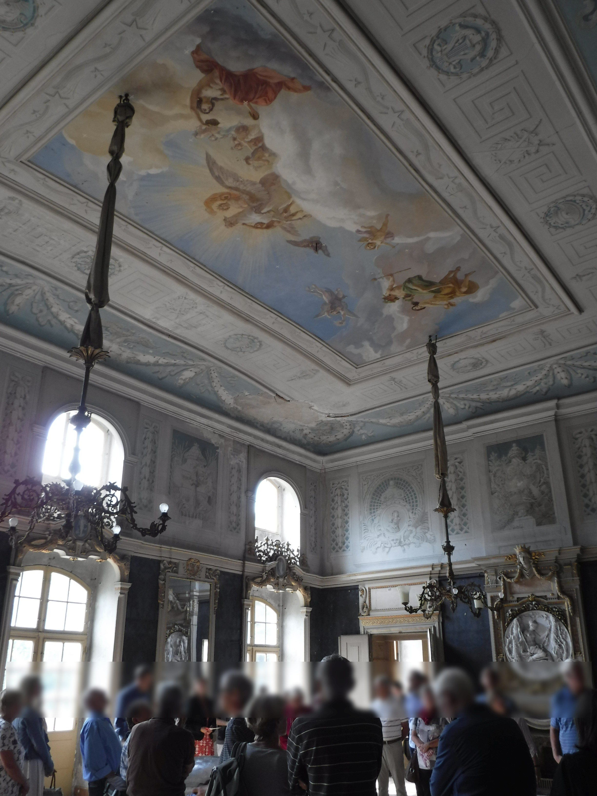 Barockschloss Wachau, Am Schloß 1, 01454 Wachau, Denkmal-ID 09301665